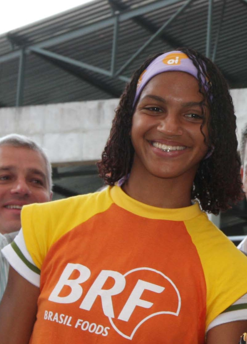 Bárbara Leôncio (Rio de Janeiro, 7 de outubro de 1991) é um atleta júnior brasileira, campeã mundial na prova dos 200 metros rasos do Mundial Juvenil de 2007, em Ostrava, na República Checa.